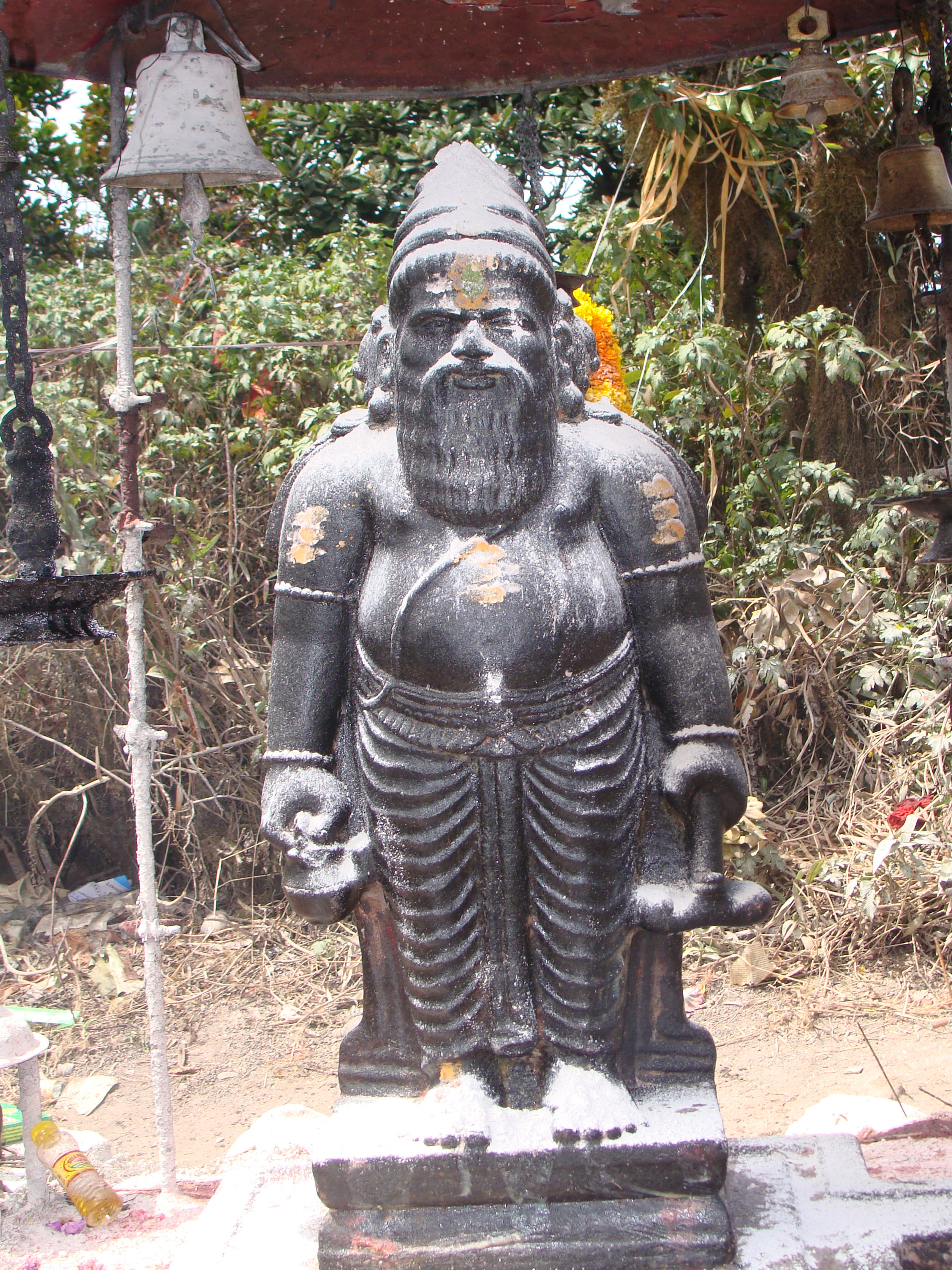 അഗസ്ത്യമുനിയുടെ പ്രതിമ.